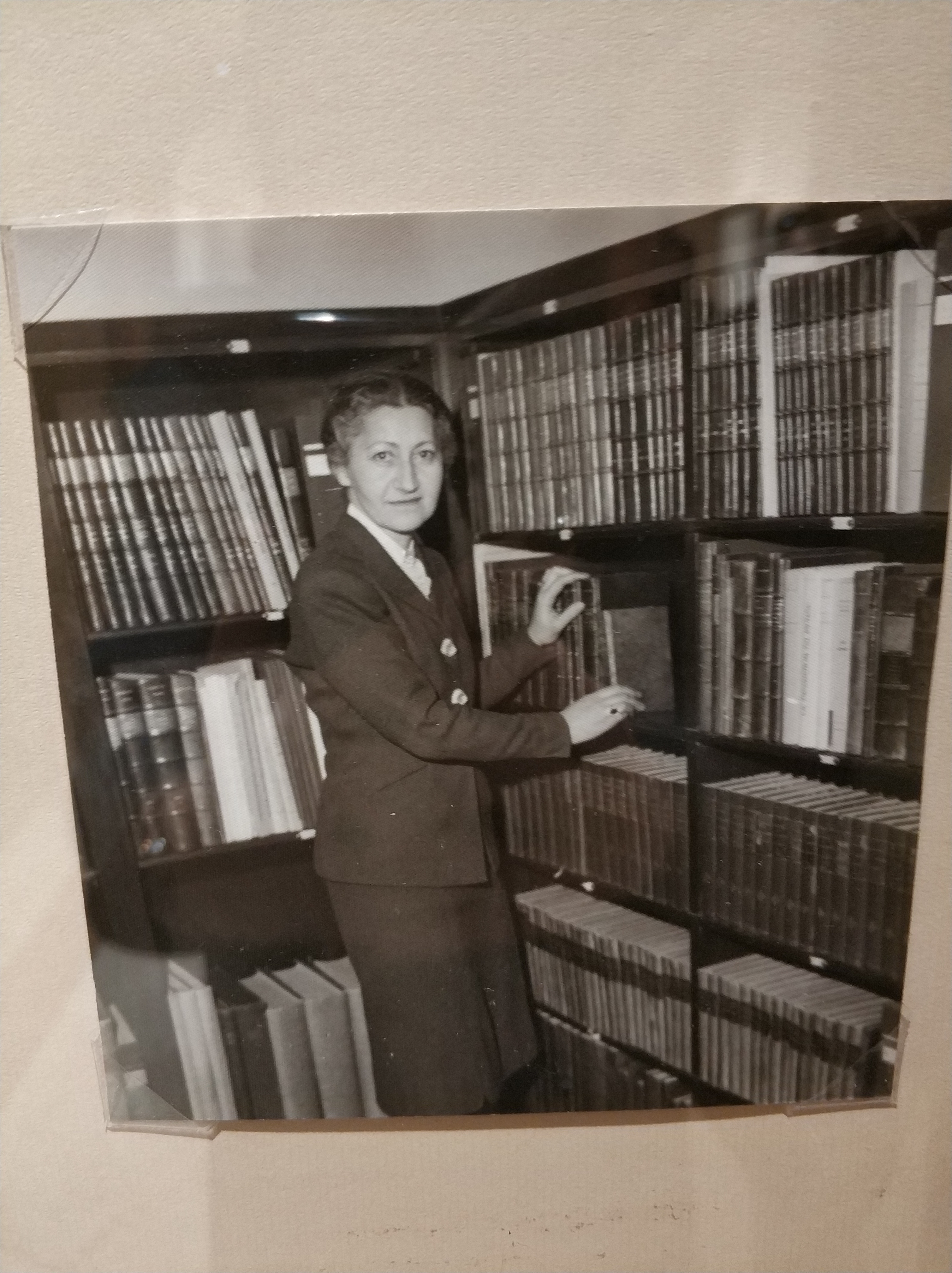 به نمایش درآمده در نمایشگاه باغ ابریشم در نوروز ۱۳۹۸ در خانه و موزه مقدم